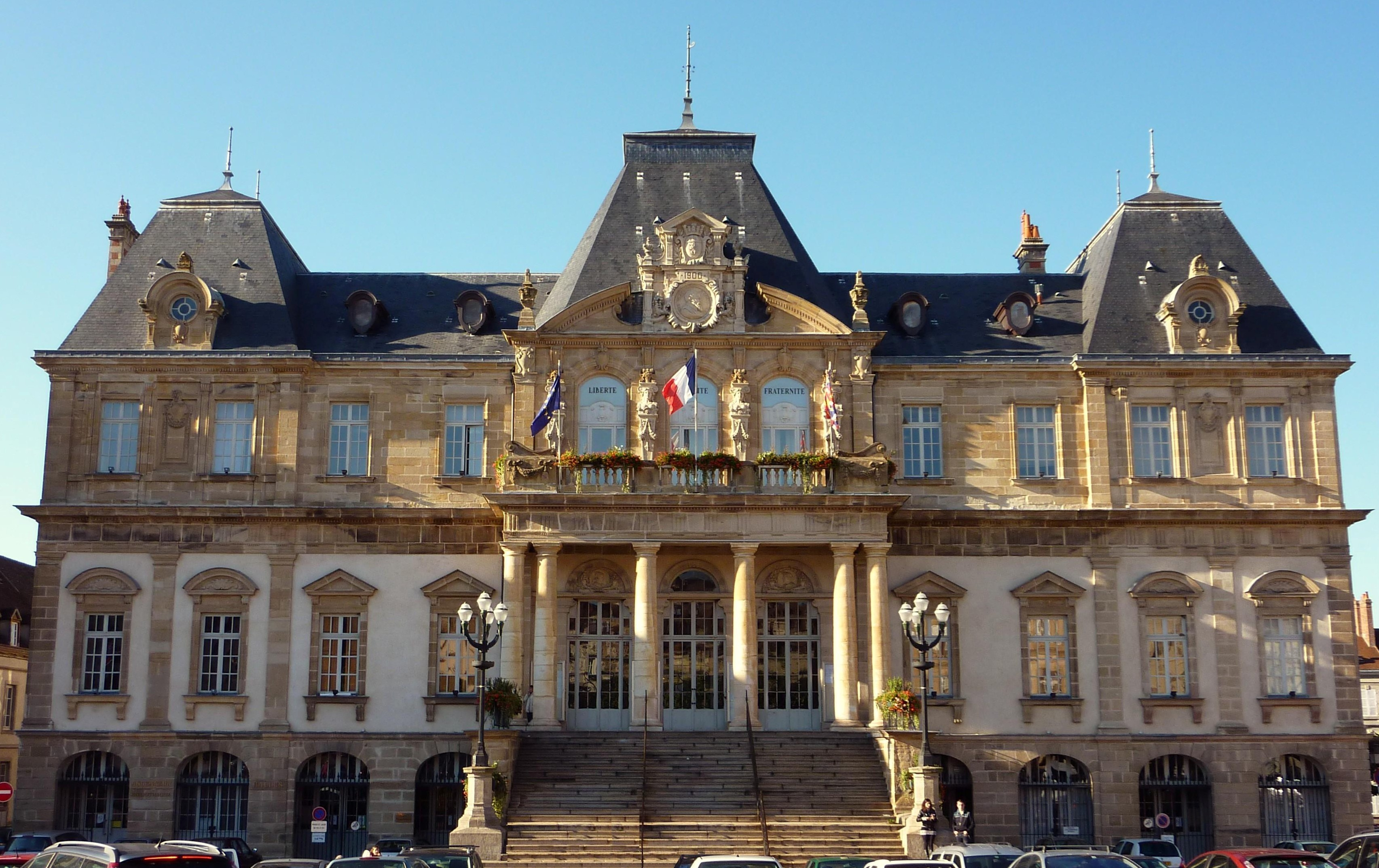 Hôtel de ville d'Autun (Saône-et-Loire, France)